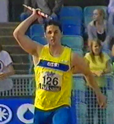 Mats Nilsson Finnkampen 2004